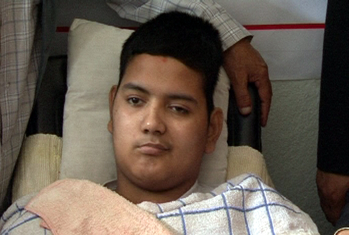 नेपाली: जनआन्दोलन २०६२/६३का घाइते